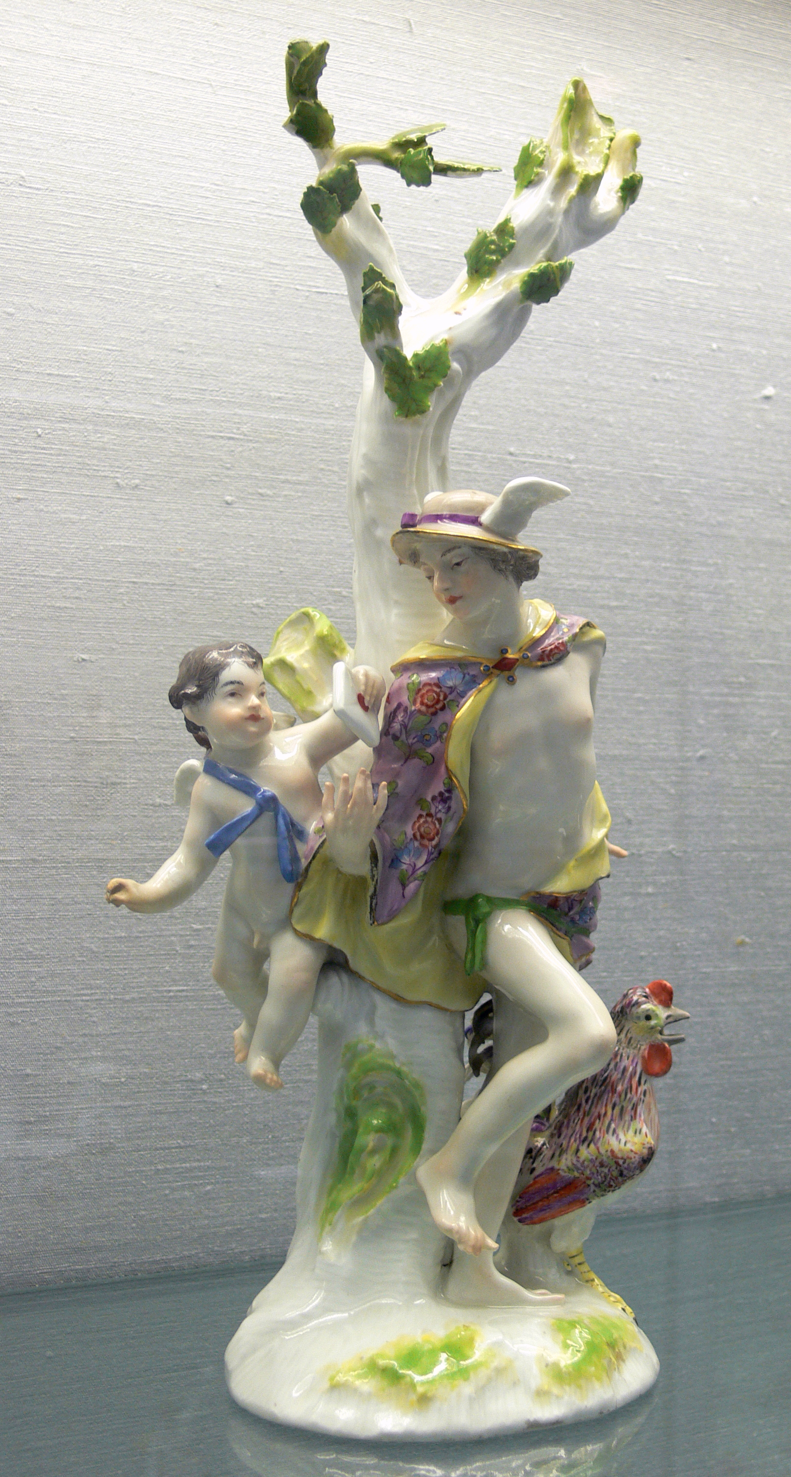 Friedrich Elias Meyer: Merkur und Amor, Königliche Porzellan-Manufaktur Berlin, um 1770 Kunstgewerbemuseum Berlin, Inv. Nr. 55,4